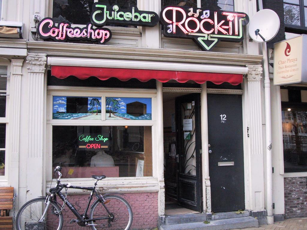 Me - 26/11/2005 - Coffeeshop Amsterdam Rockit